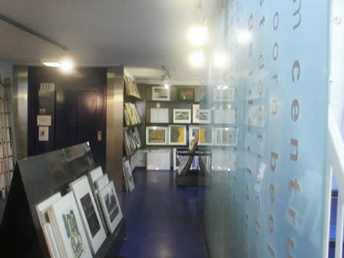 Arnhem: blik in een kunstuitleen annex van het Centrum Beeldende Kunst, Gelderland